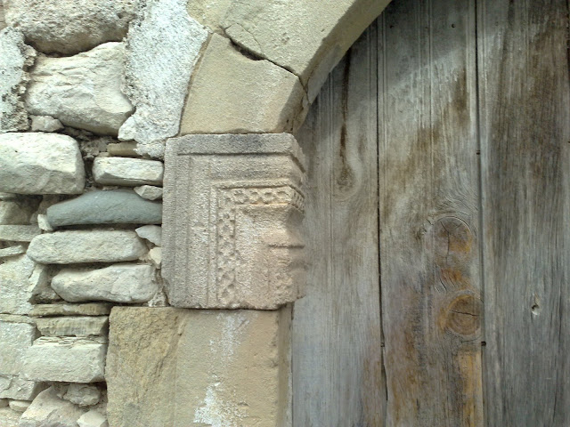 Λεπτομέρεια από εκκλησία Παναγίας Παντάνσσας